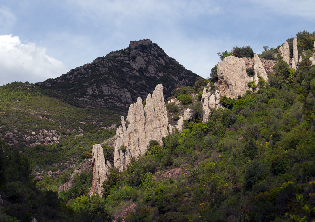 Discordances progressives de Sant Salvador de les Espases (Baix Llobregat) This is a a photo of a geologic site or geotope in Catalonia, Spain, with id: IEIGC-327